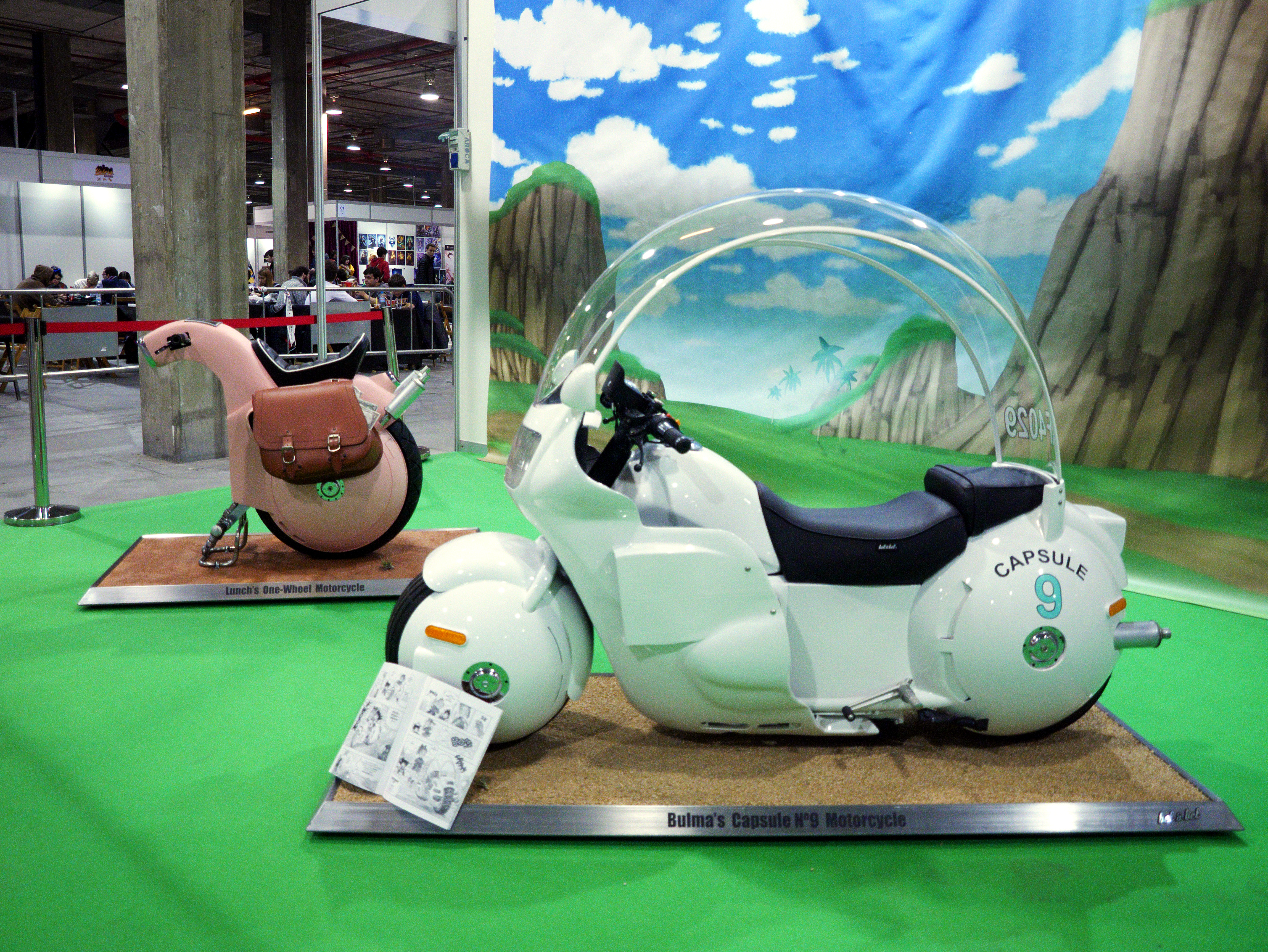 Si hi ha una moto futurística mítica —a banda de la de Kaneda— en l'anime dels 80, és la de Bulma en Bola de drac.